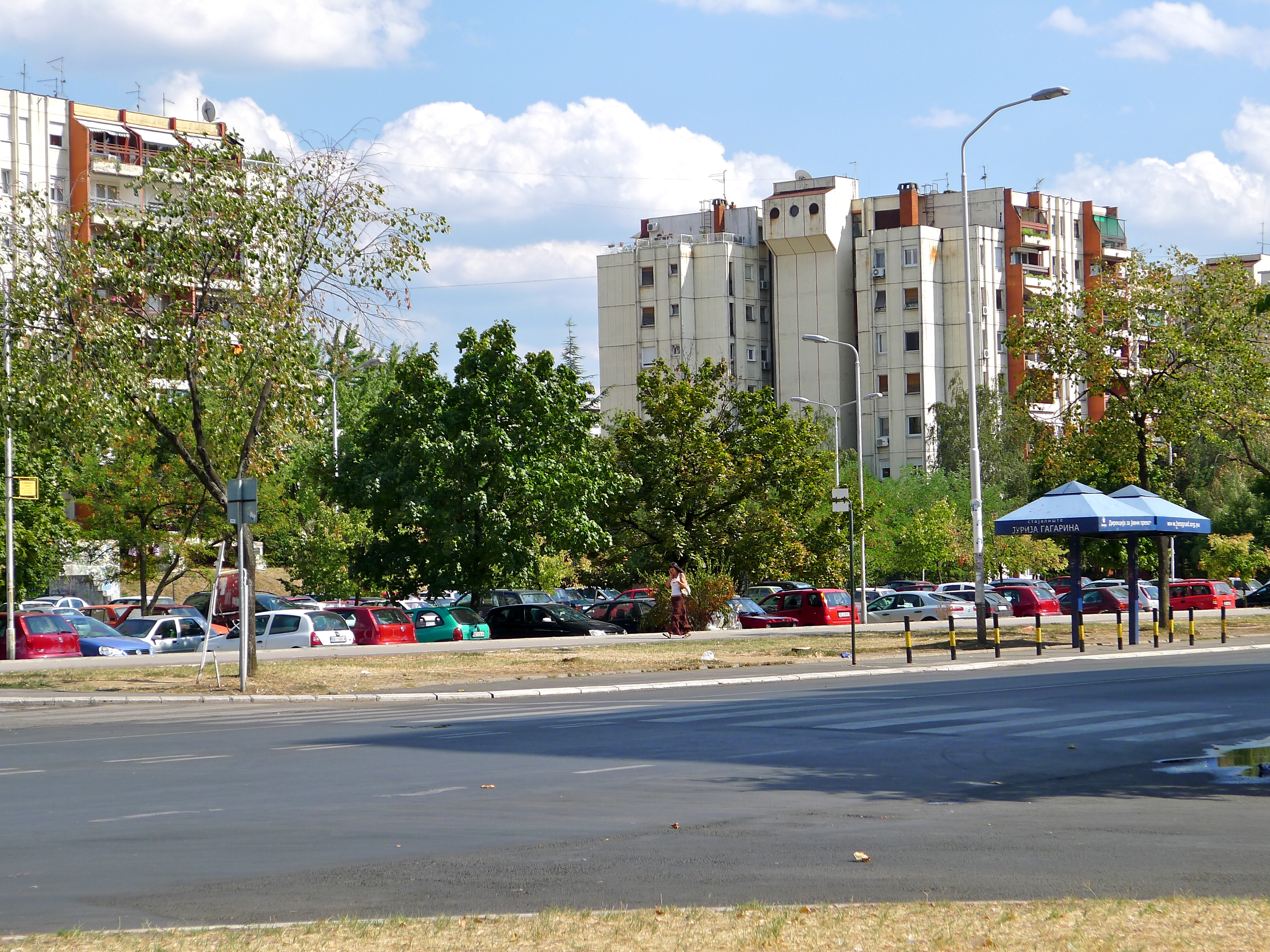 Блок 70а